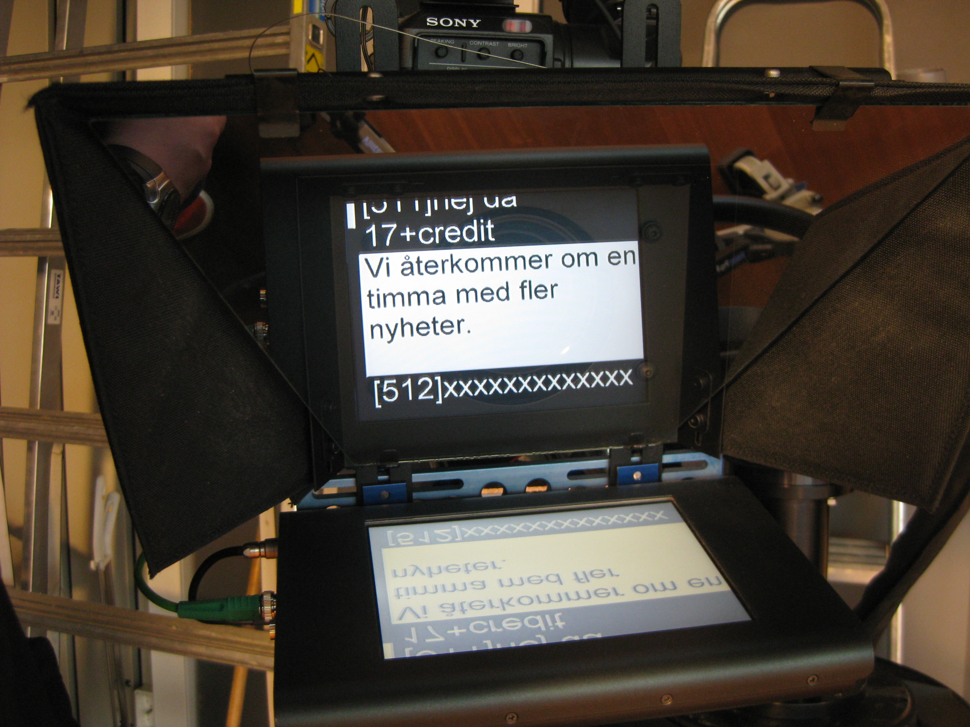 Promter firmy Autoscript w studio telewizyjnym w Göteborgu.